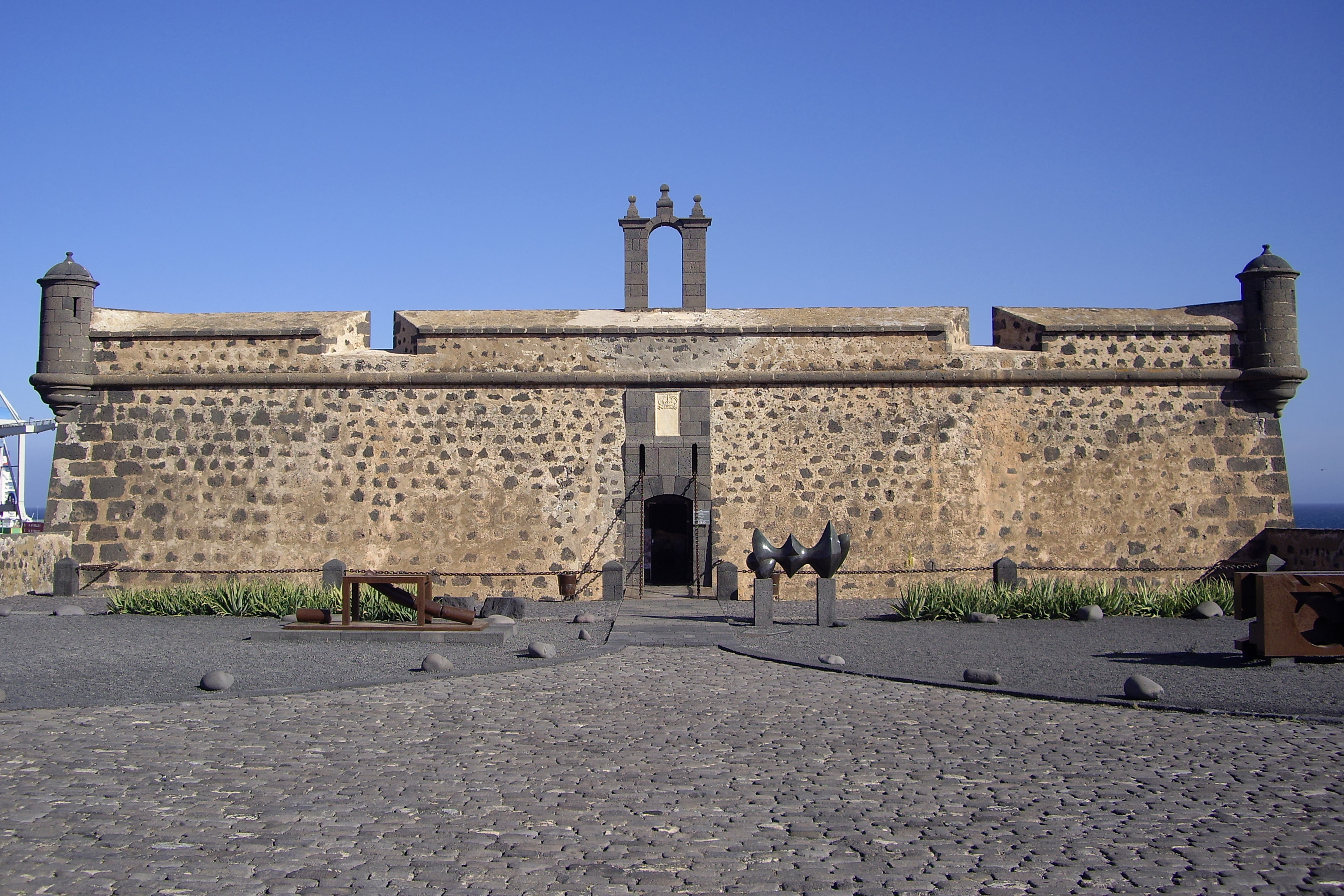 Castillo de San José-Arrecife-Lanzarote(RI-51-0008260)